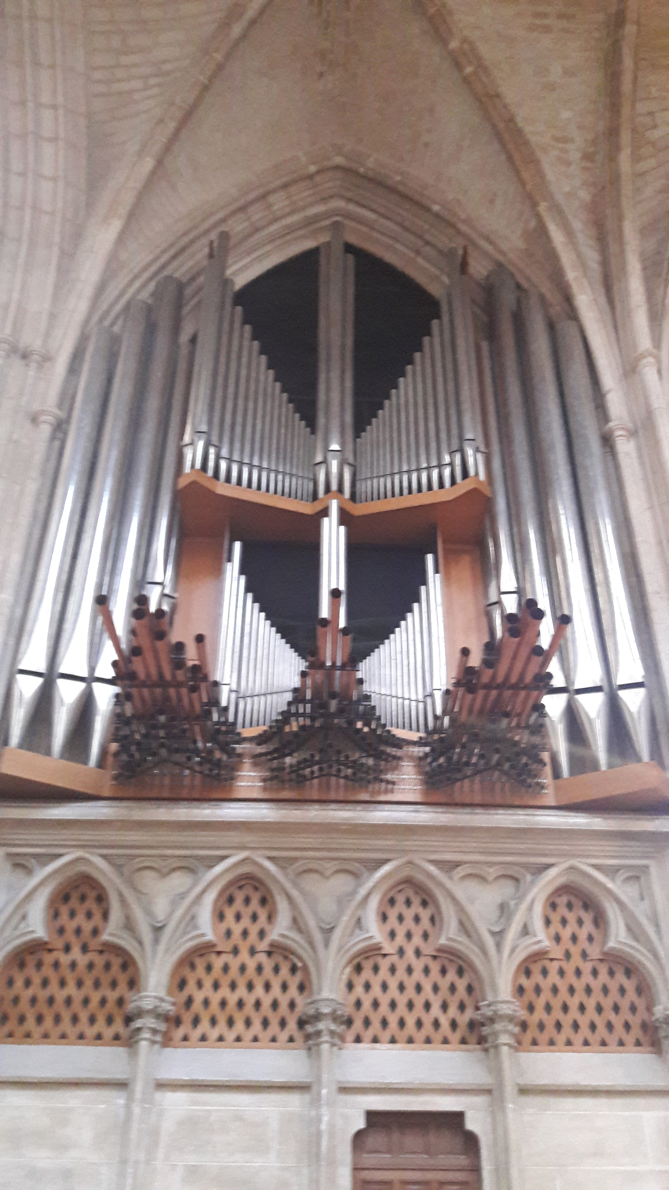 Vue de l'orgue de la cathédrale d'Auxerre